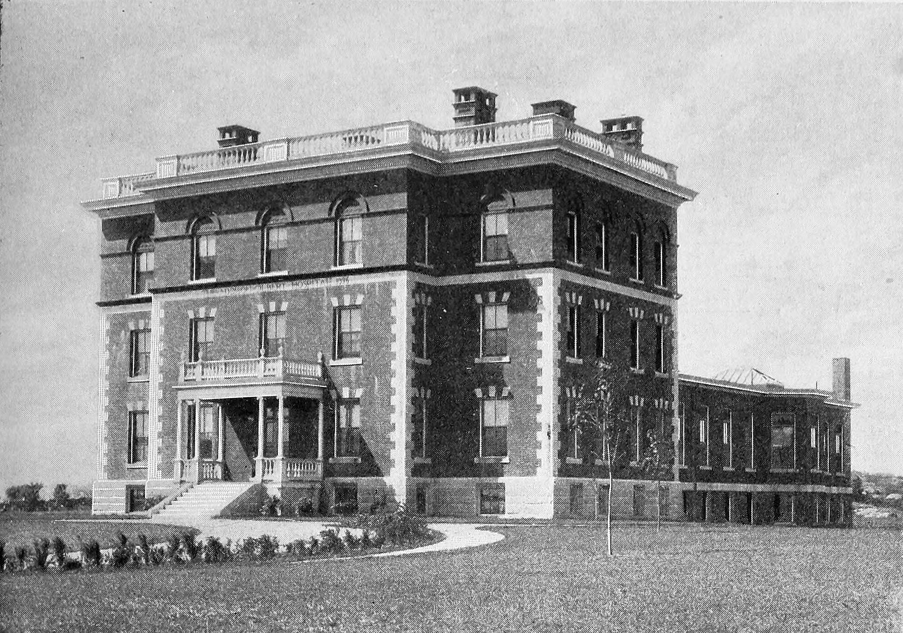 Addison Gilbert Hospital, Gloucester, Massachusetts.